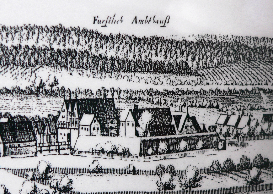 Coppenbrügge, Teil eines Kupferstiches von Matthäus Merian